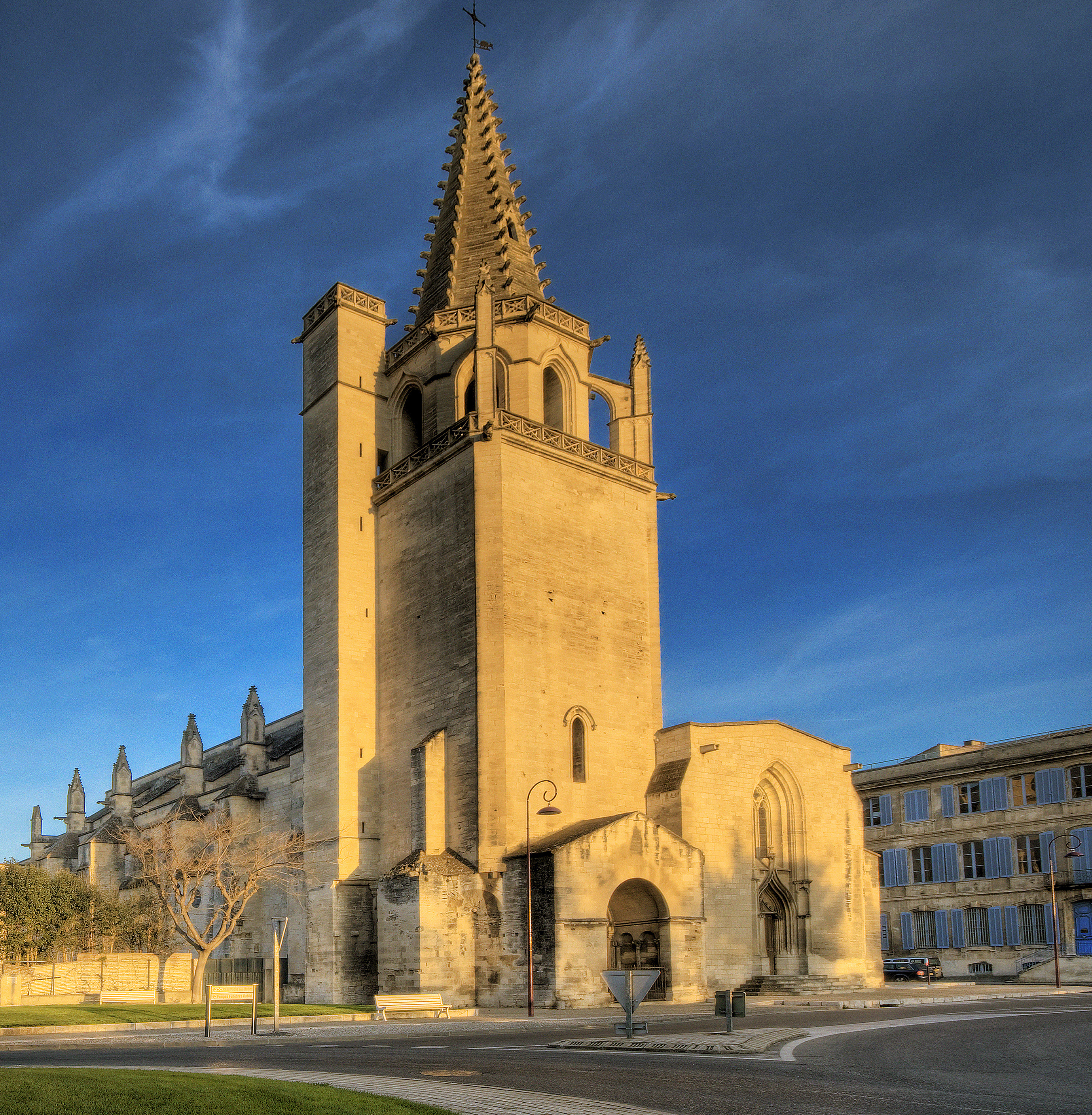 Tarascon est une commune française, située à l'extrémité Ouest du département des Bouches-du-Rhône et de la région Provence-Alpes-Côte d'Azur. Ses habitants sont appelés les Tarasconnais.